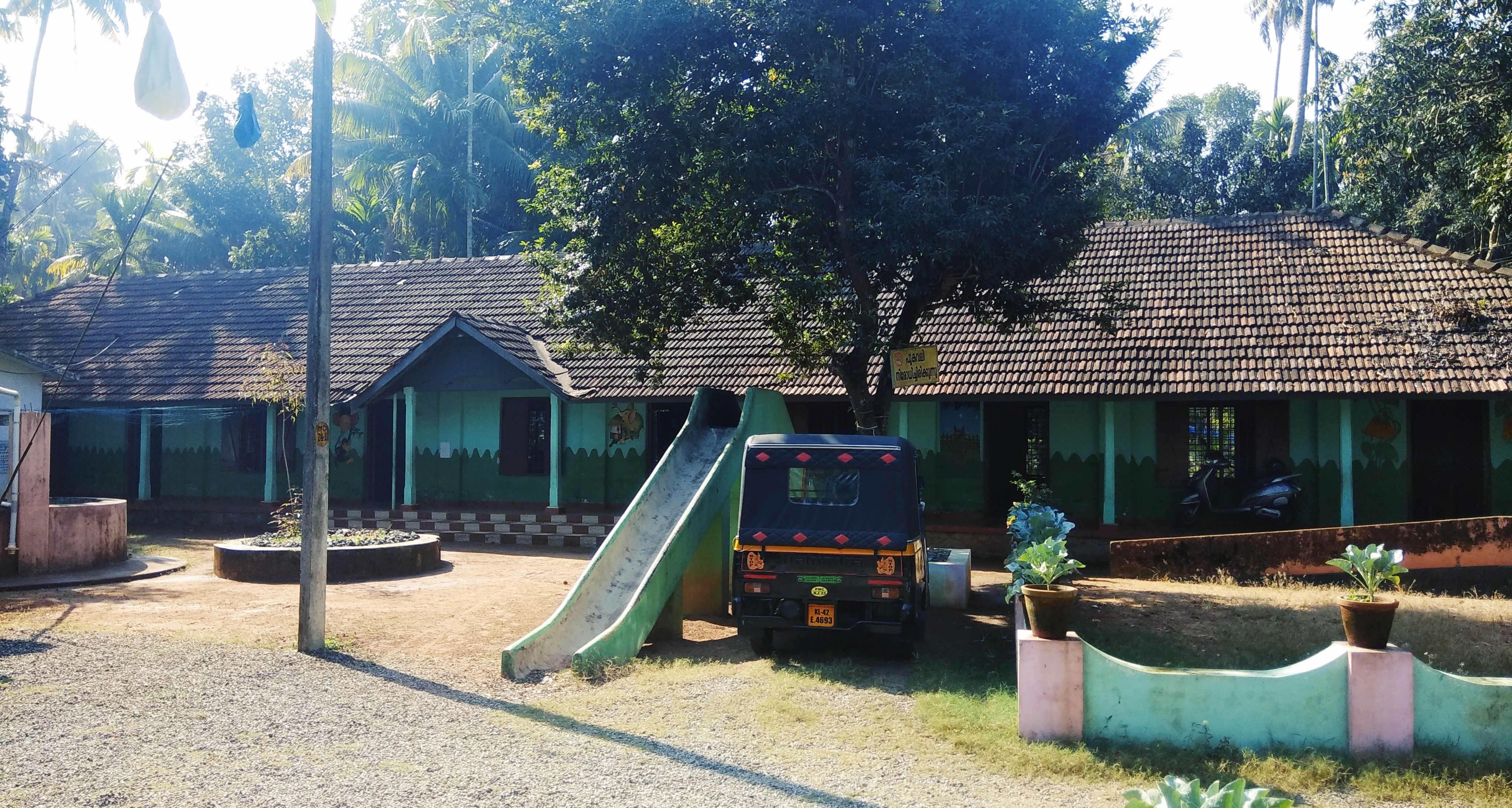 ഗവ. മുഹമ്മദന്‍ എല്‍ പി സ്കൂള്‍ വടക്കേക്കര